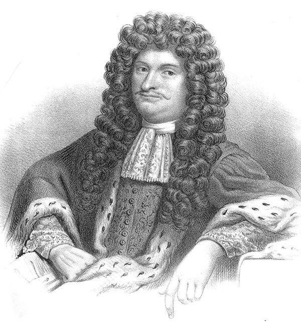 Johan Göransson Gyllenstierna (1635-1680)